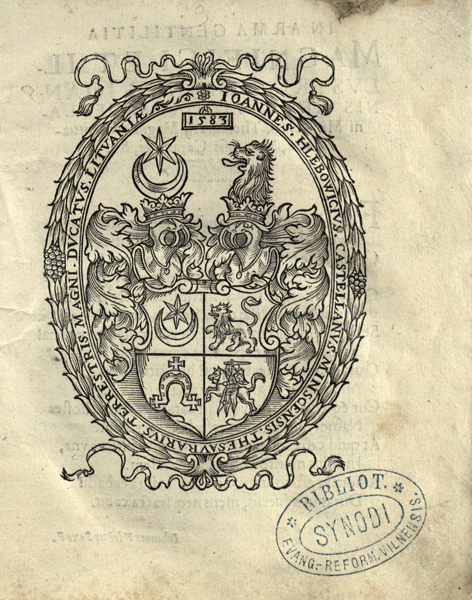 Беларуская (тарашкевіца): Герб Яна Глябовіча (Jan Hlabovič) з Пагоняй (Pahonia)